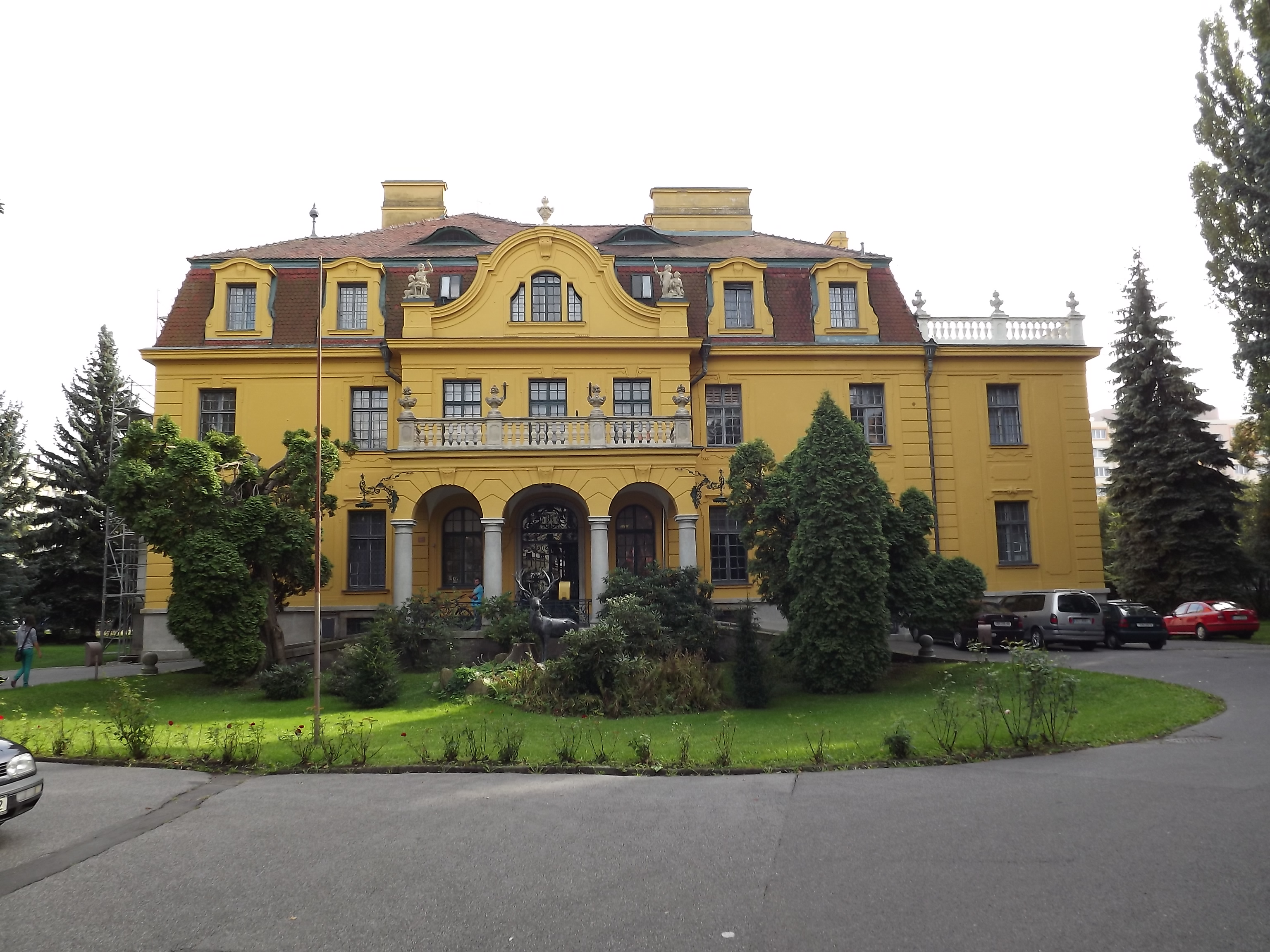 vila Hardtmuthova, U Zimního stadionu 19/1, České Budějovice